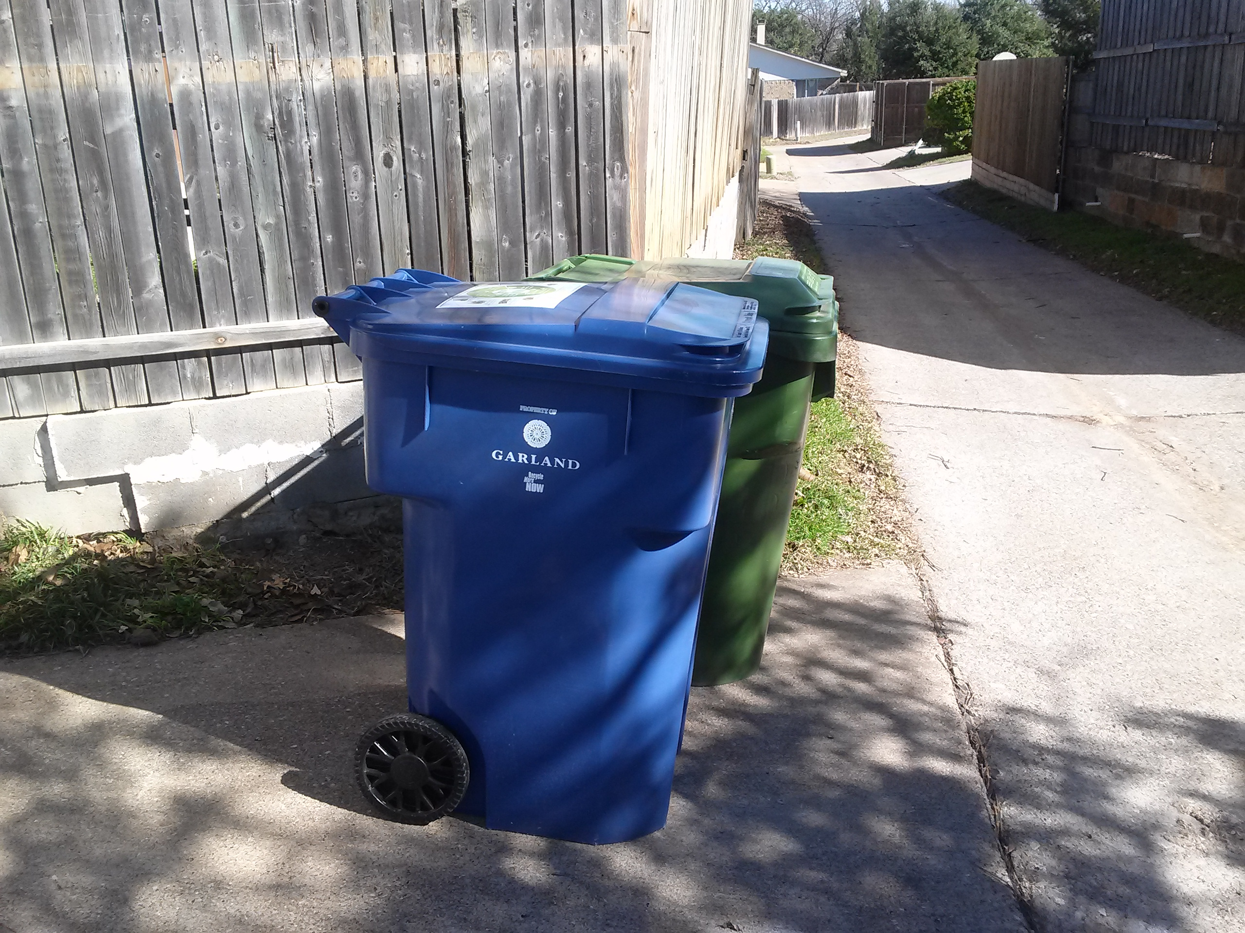 Contenedores de basura y reciclaje de la ciudad suburbana Garland de Dallas, Texas